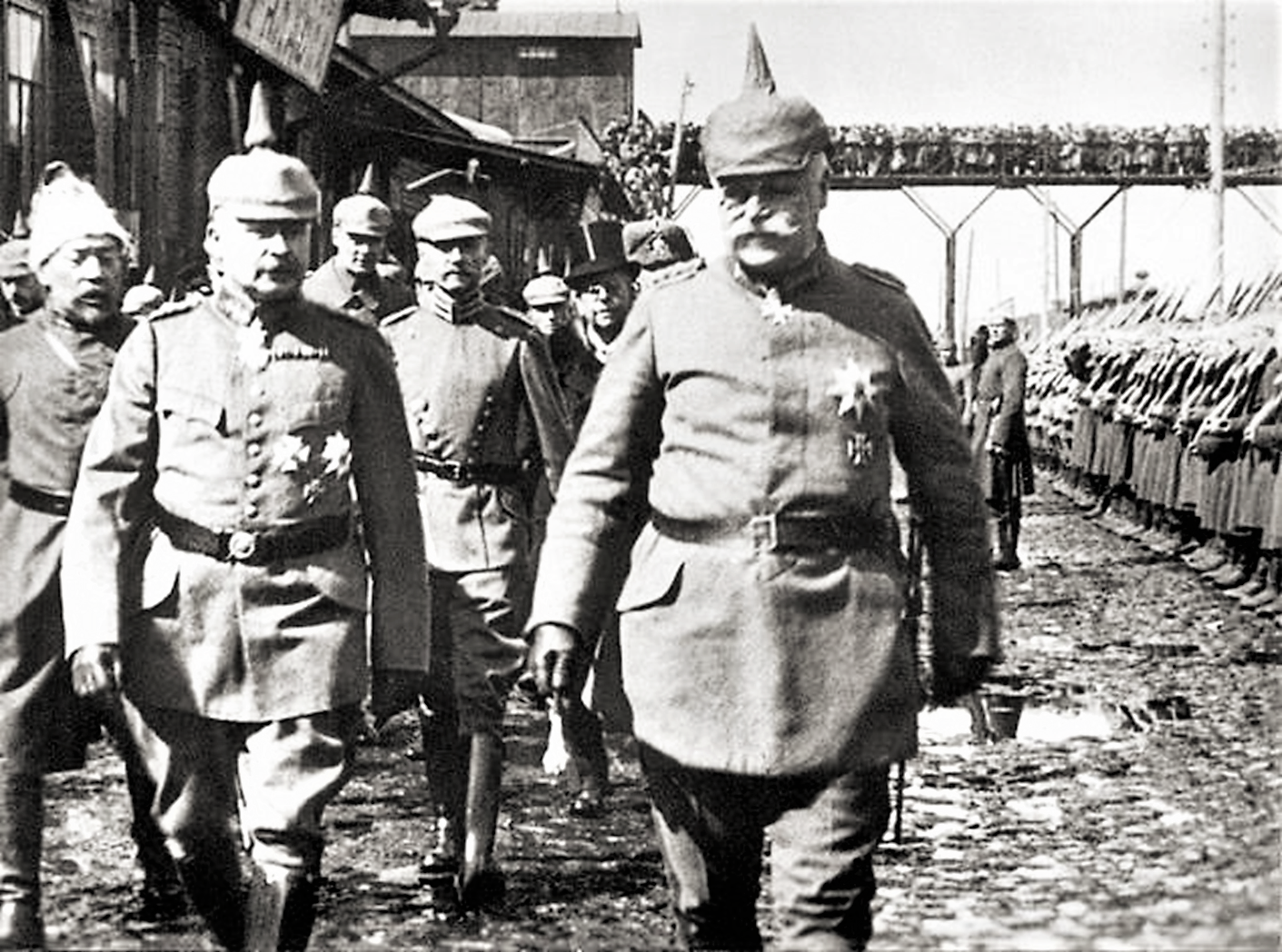 Generalfeldmarschall Eichhorn in Kiew, 1918